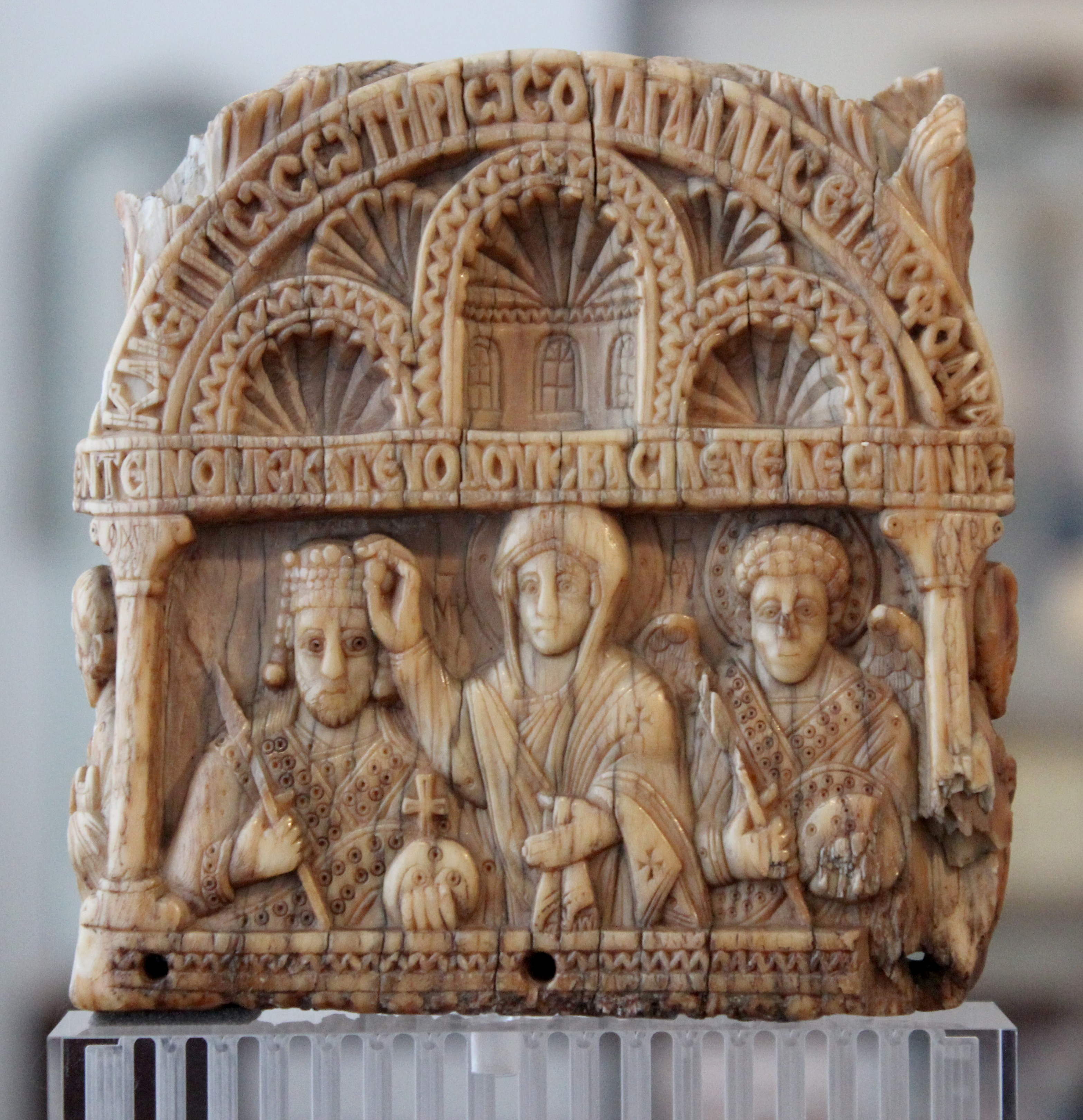 Berlín, Bode-Museum, peine de marfil del emperador León VI. Constantinopla, entre 886 y 912.